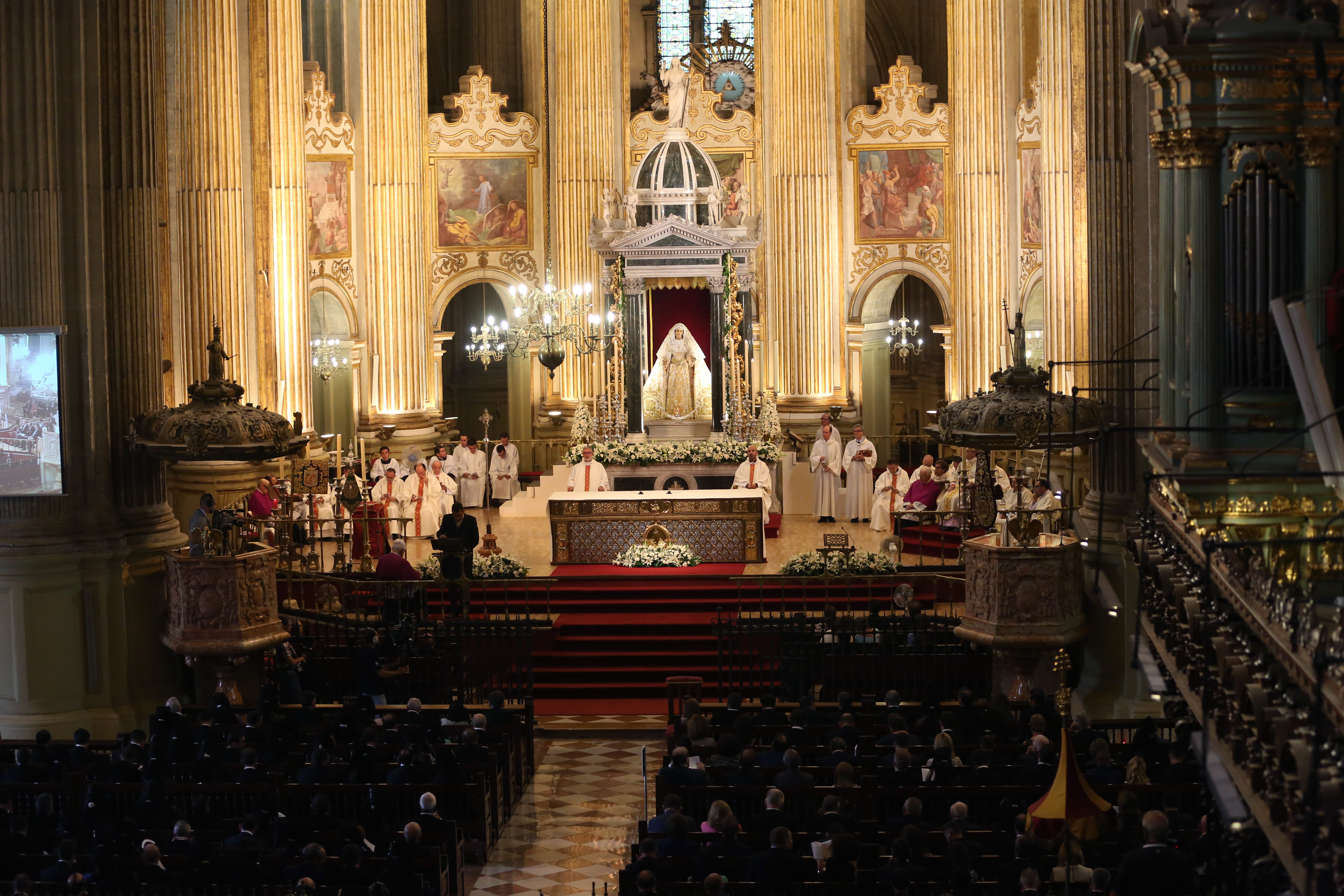 Aspecto interior de la Catedral de Málaga durante la coronación